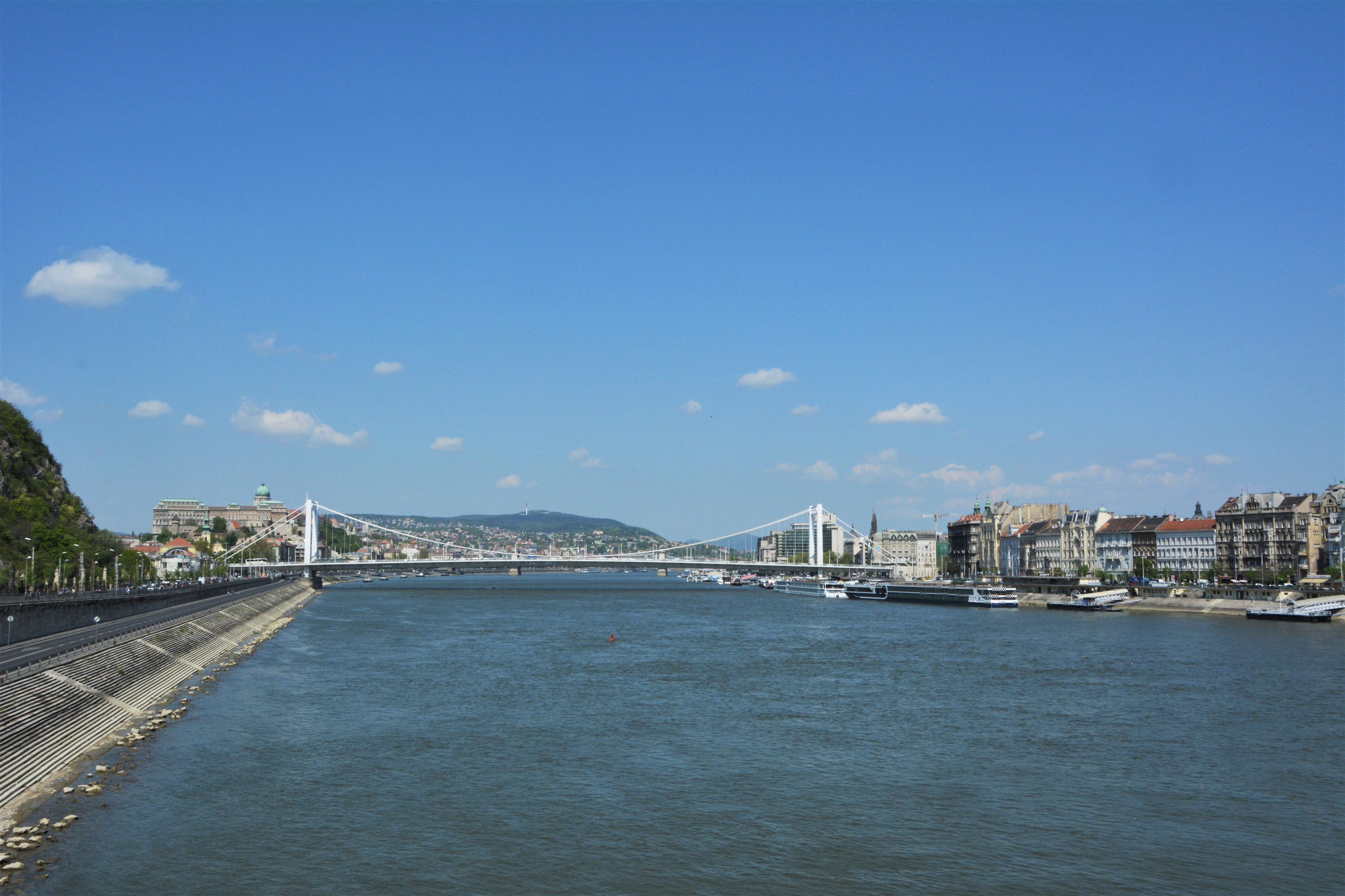 міст Ержебет у Будапешті, Угорщина